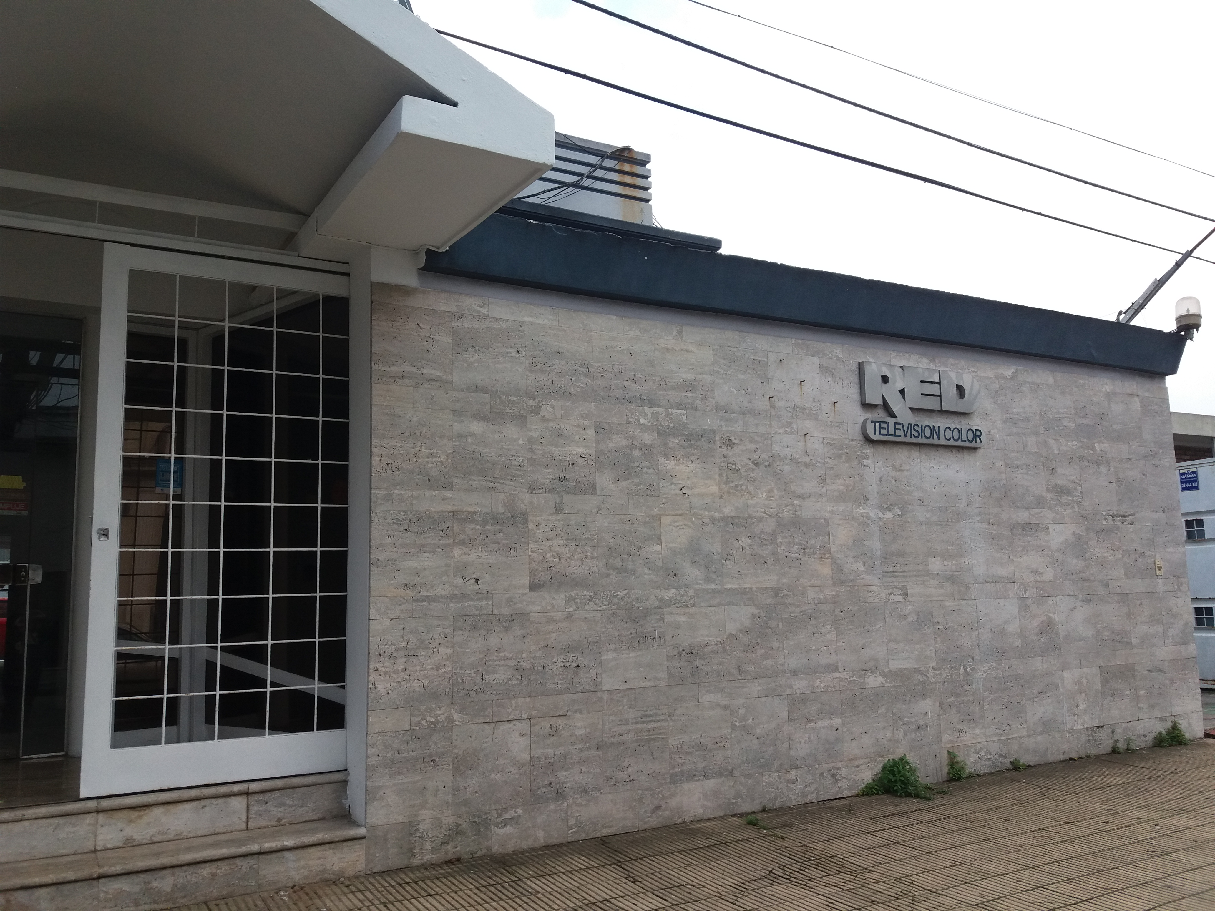 Estudios y planta transmisora de La Red y el canal de cable A+V, ubicados en la calle Gral. Enrique Martínez 1337, en Montevideo, Uruguay.